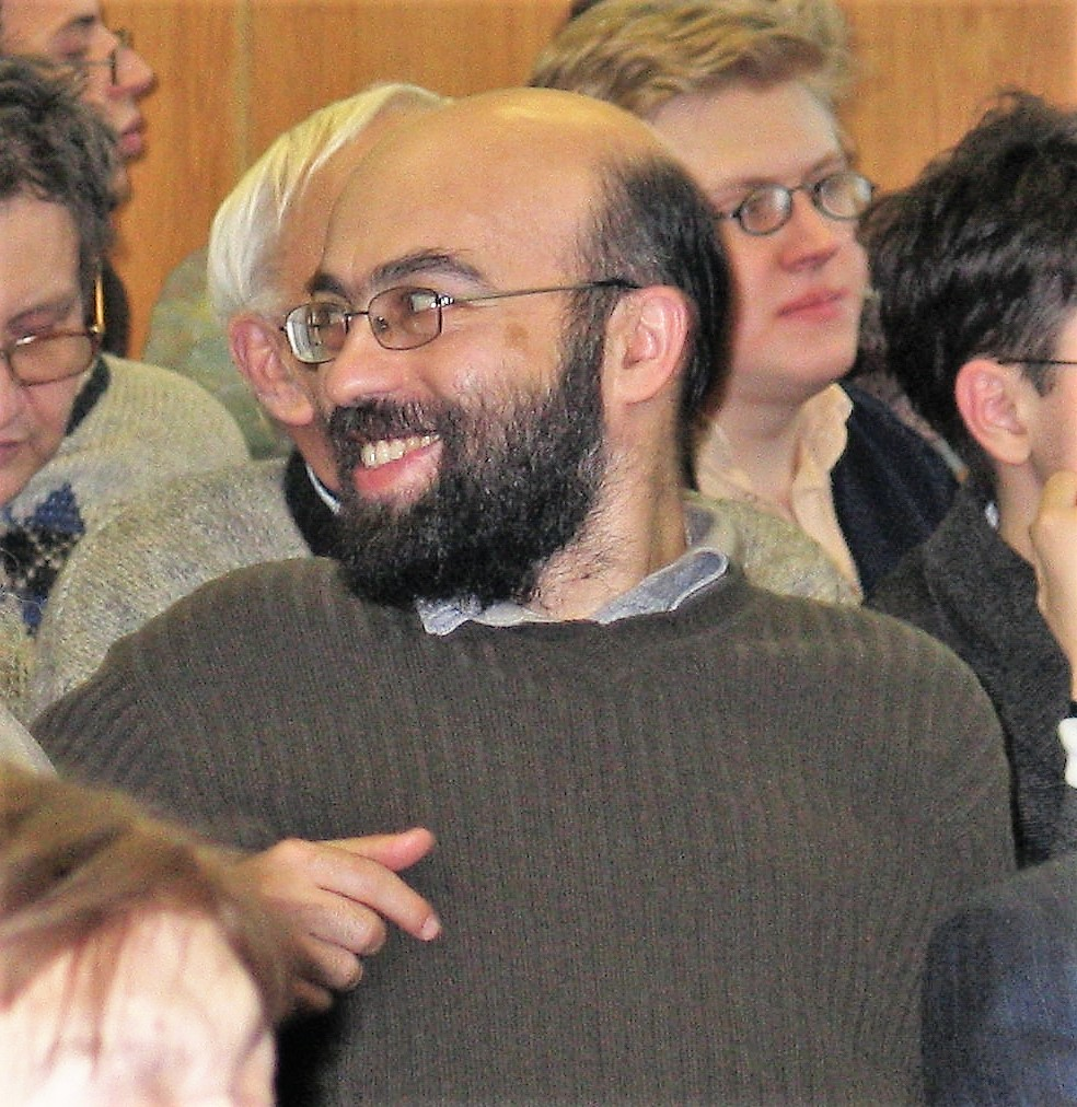 В. А. Плунгян на презентации тома «Славянские языки» издания «Языки мира», Институт языкознания РАН, Москва, март 2005 года.